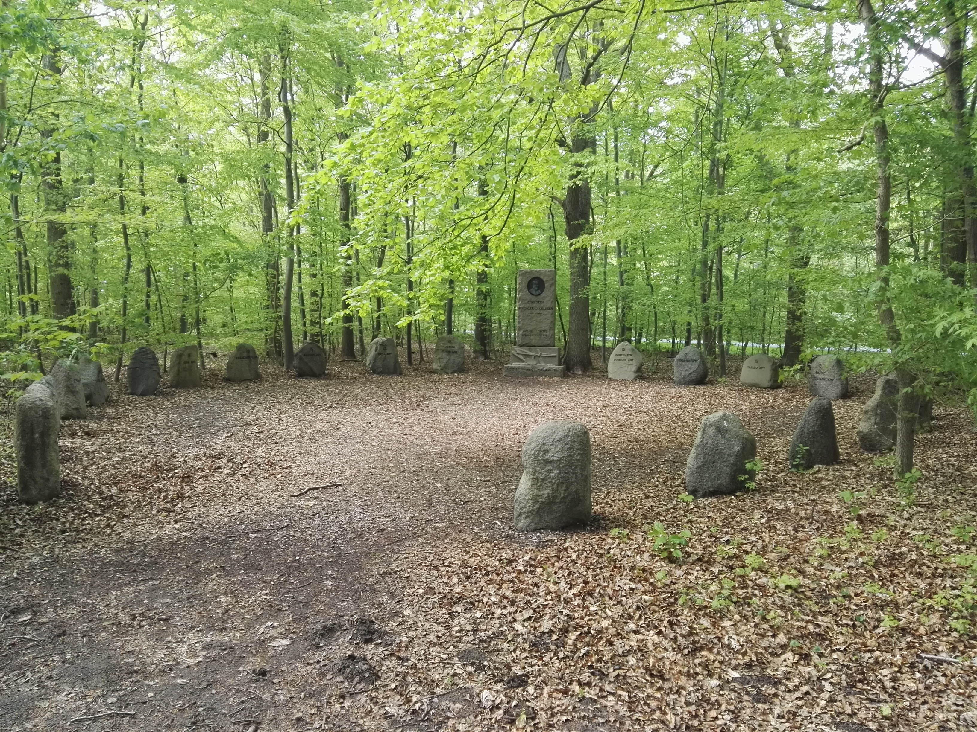 Kreds af sten for de 22 amter og amtsrådskredse, der var før 1970, samt mindesten for Christen Moesgaard-Kjeldsen i Rødby Fjord Mindepark